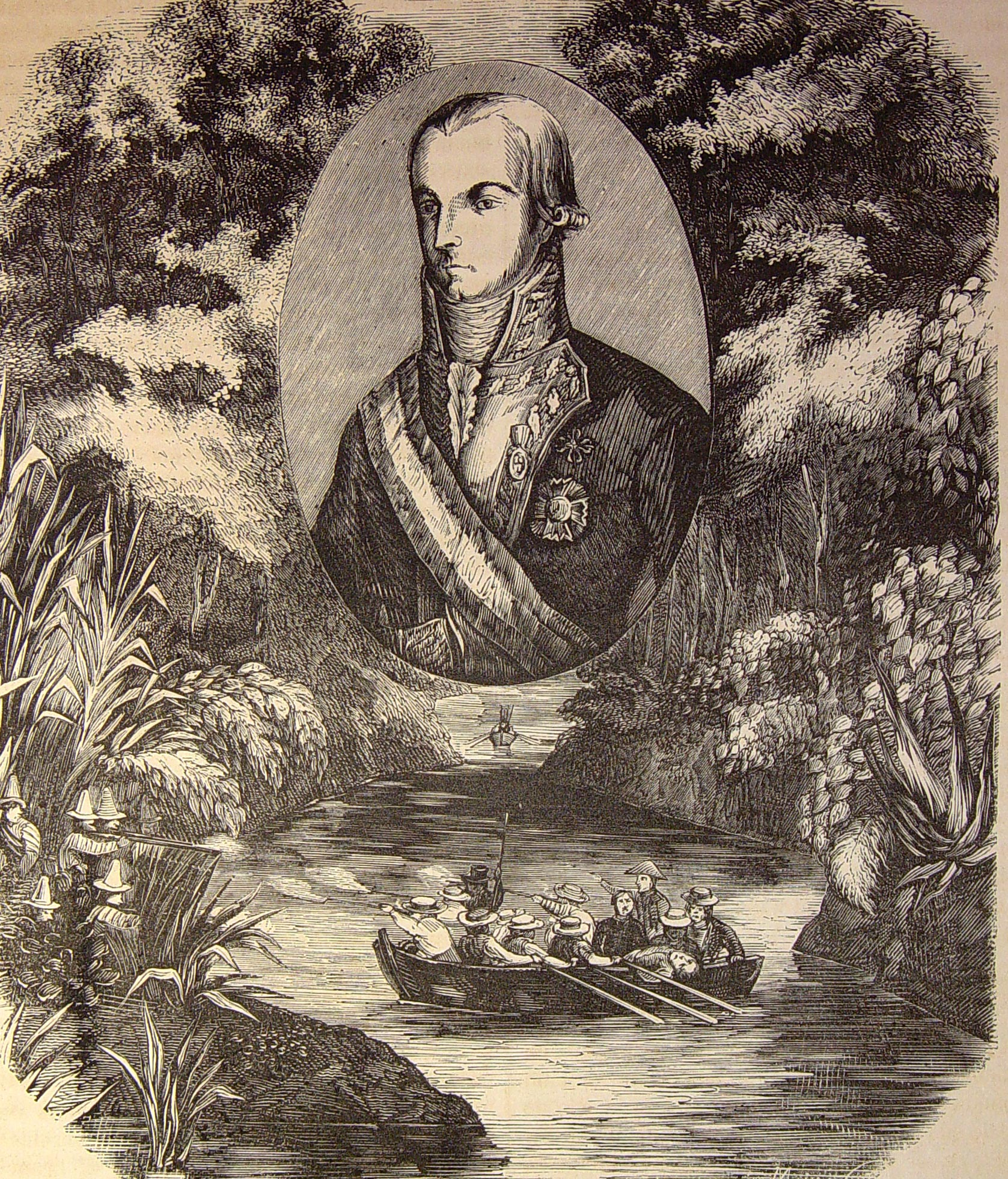 Ramón García de León, el primer marqués de la Casa de Pizarro Ilustraciones pertenecientes al libro: Las glorias nacionales : grande historia universal de todos los reinos, provincias, islas y colonias de la Monarquía Española, desde los tiempos primitivos hasta el año de 1852. - Madrid [etc.] (Barcelona : Imprenta de Luis Tasso) Librería de la Publicidad [etc.], 1852-1854.